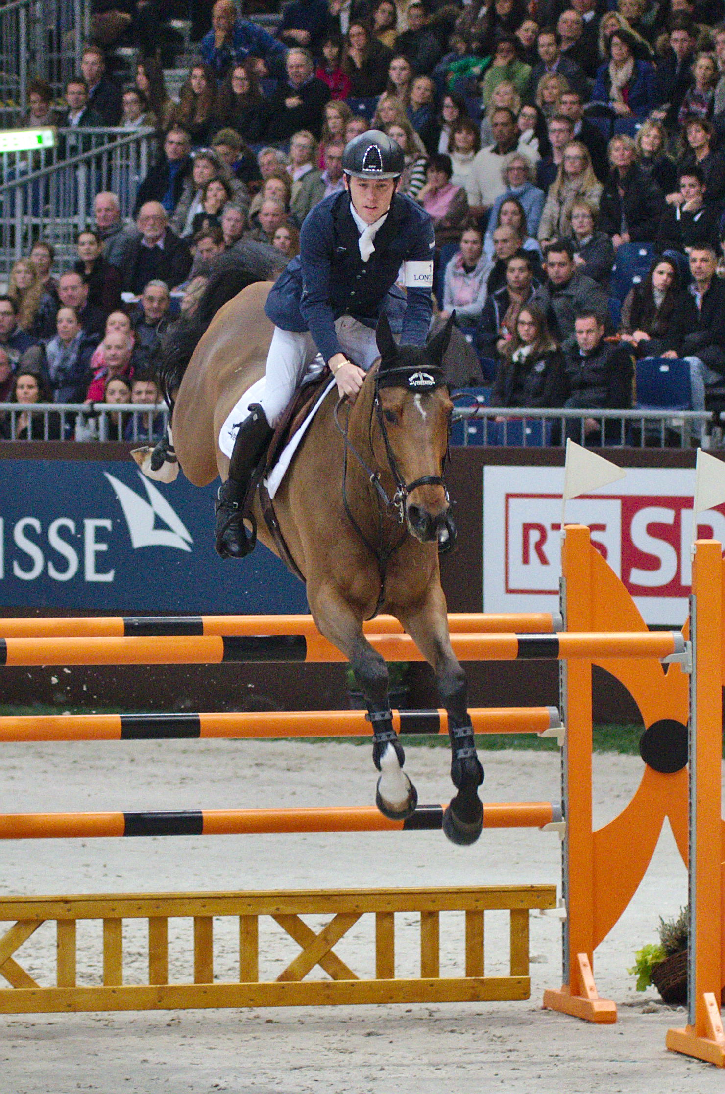 54eme CHI de Genève - 20141212 - Scott Brash et Hello Sanctos